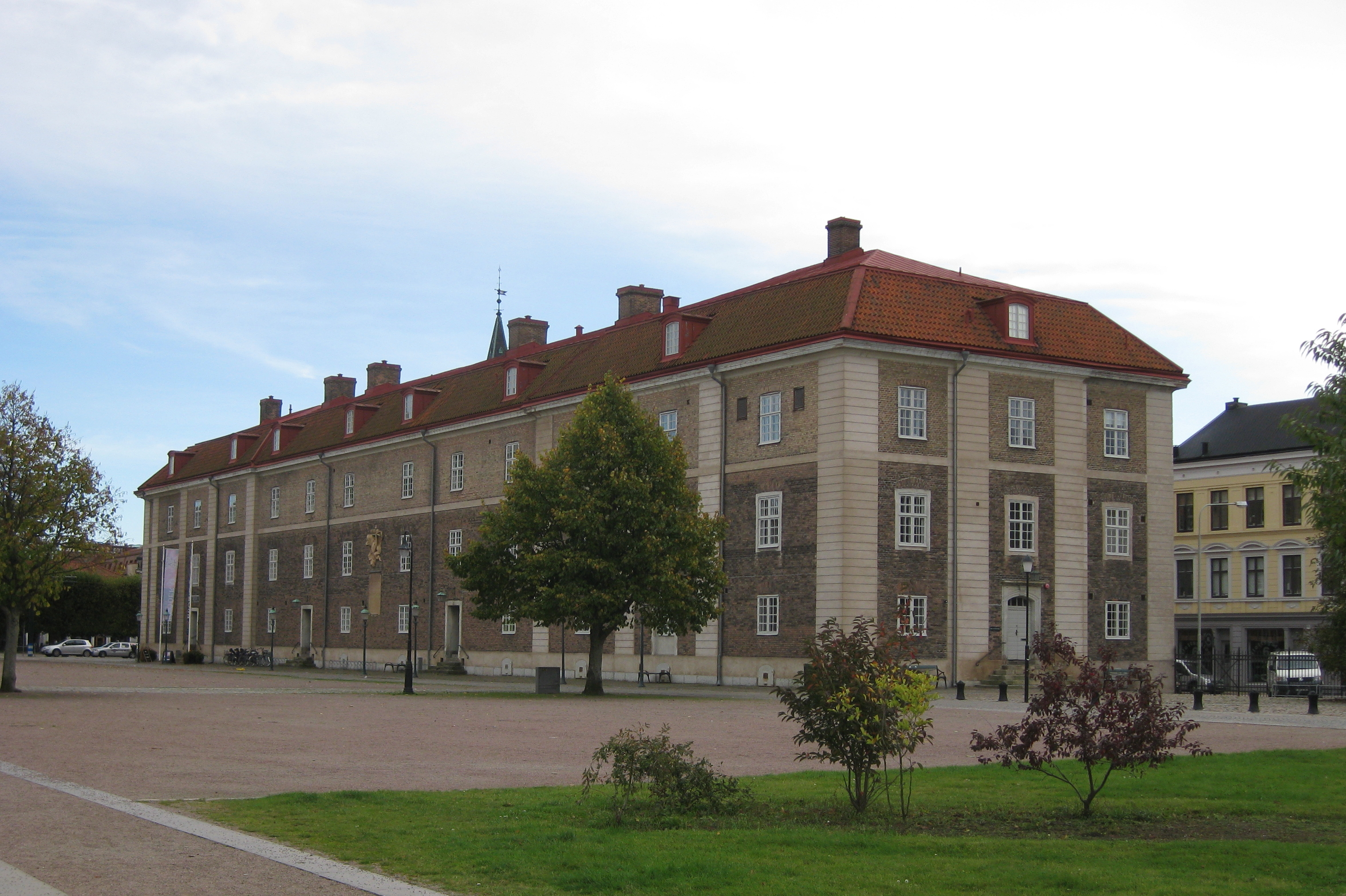 Landskrona museum